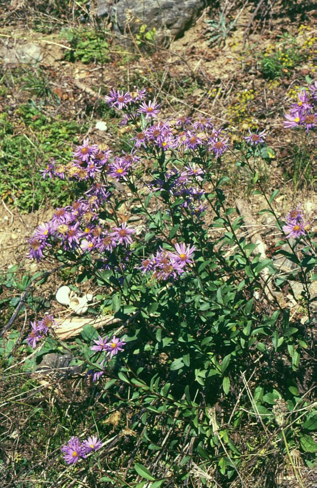 Kalk-Aster (Aster amellus), Korbblütler (Asteraceae) - Österreich/Austria/Autriche: Niederösterreich, Kamptal, bei Kamegg, auf Marmor